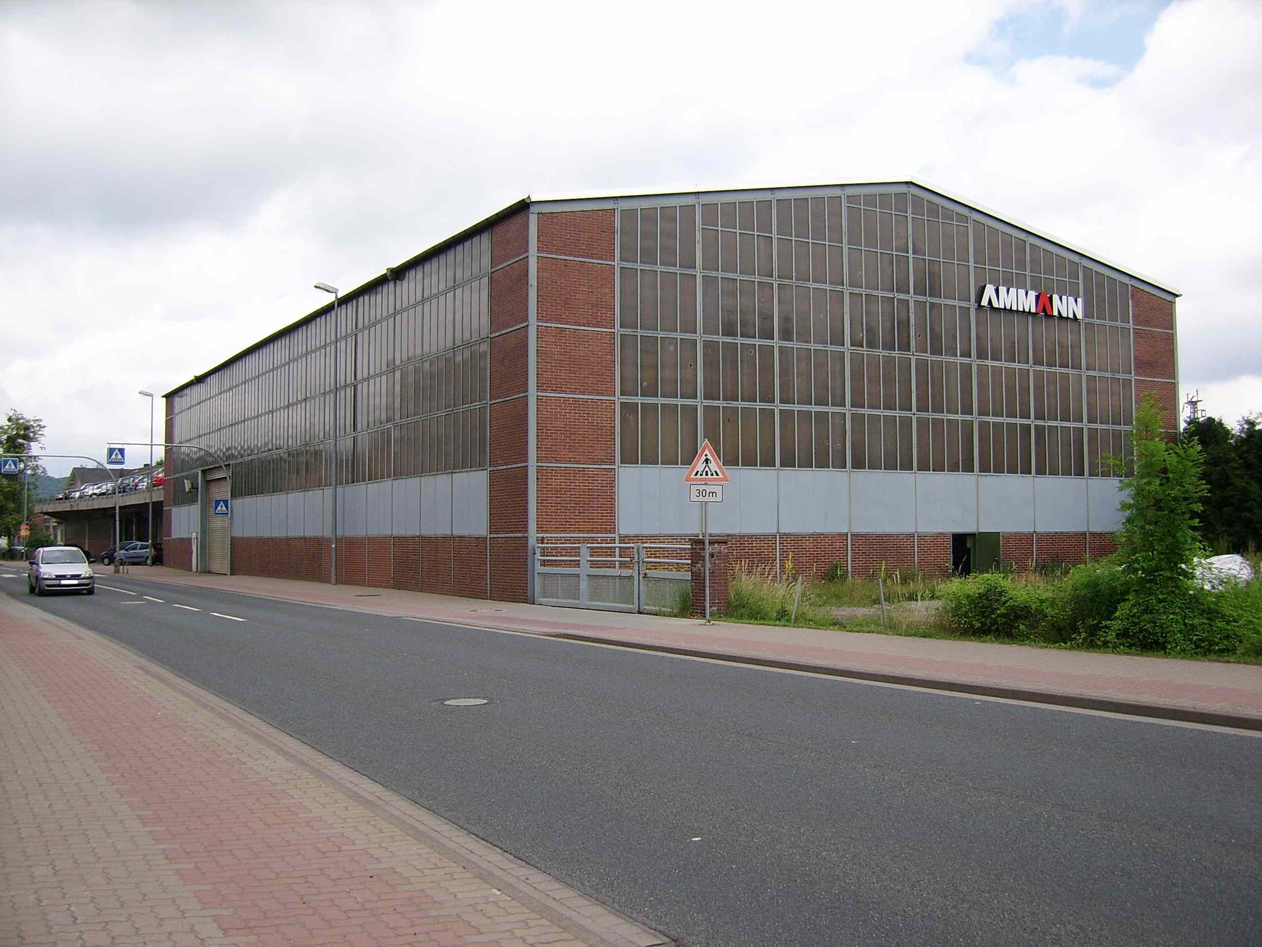 Halle der Ammann Asphalt GmbH in Alfeld, früher Materiallager der Alfelder Eisenwerke. Durch das Tor rechts neben der Halle führte früher der Gleisanschluss zur Montagehalle auf der anderen Straßenseite. Im Hintergrund ist die Garage zu sehen.